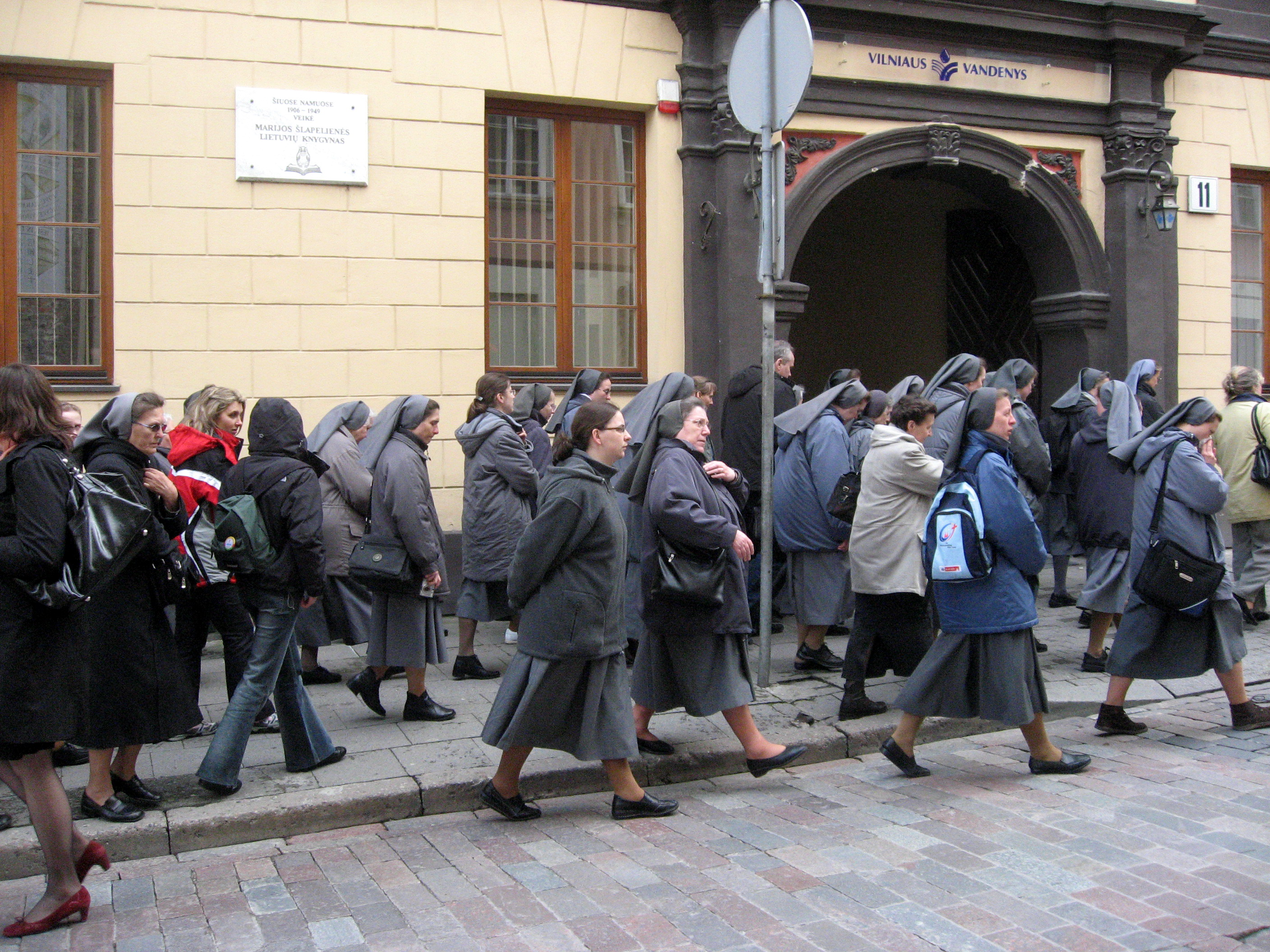 Polské jeptišky ve Vilniusu